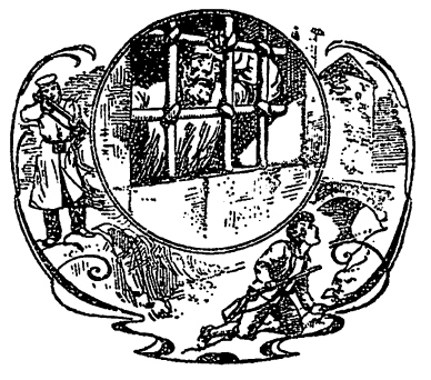 Erzgebirgische Dorfgeschichten